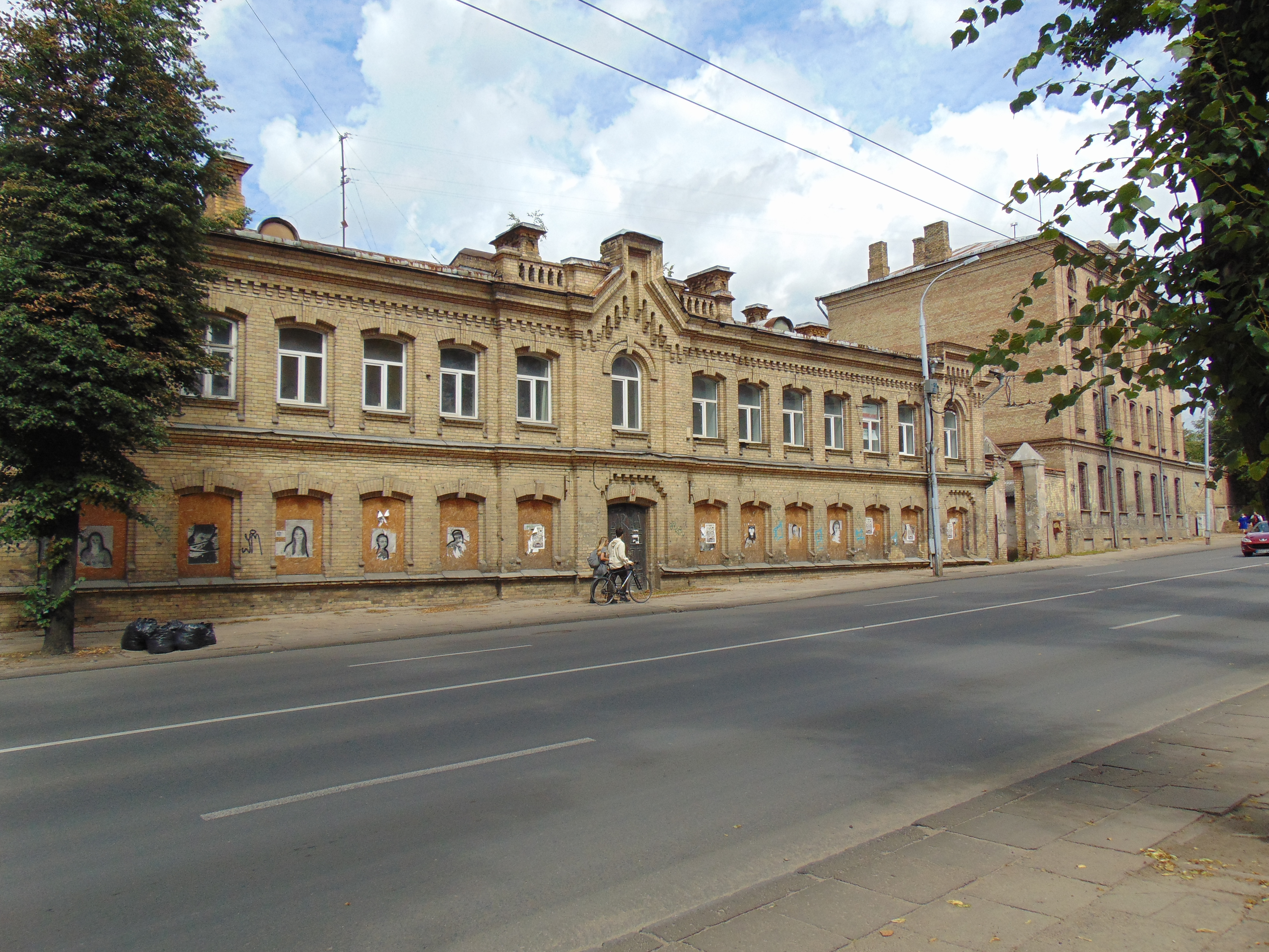 T. Kosciuškos g. 6